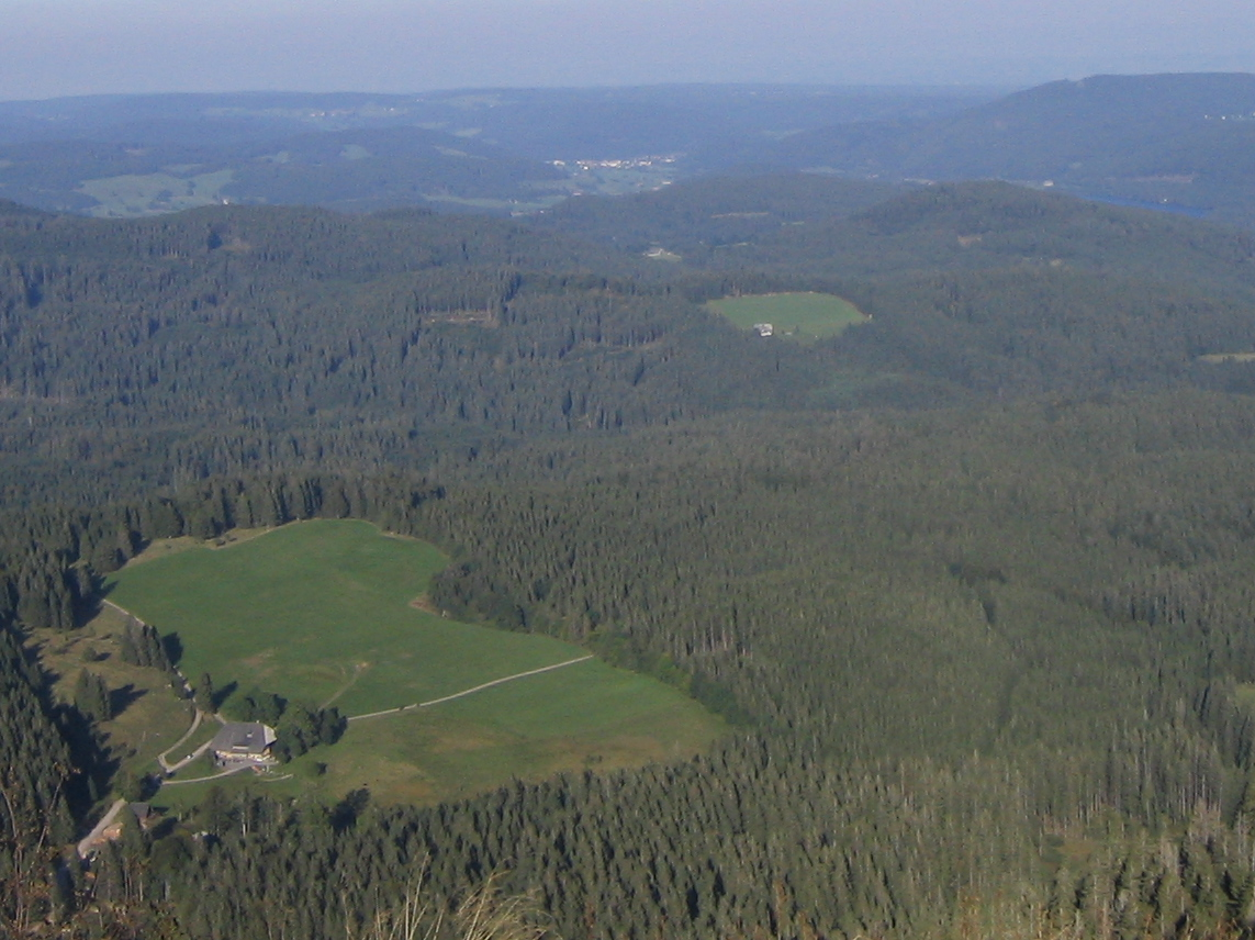 Raimartihof (vorne links) und Ramselehof (Mitte) vom Seebuck aus gesehen